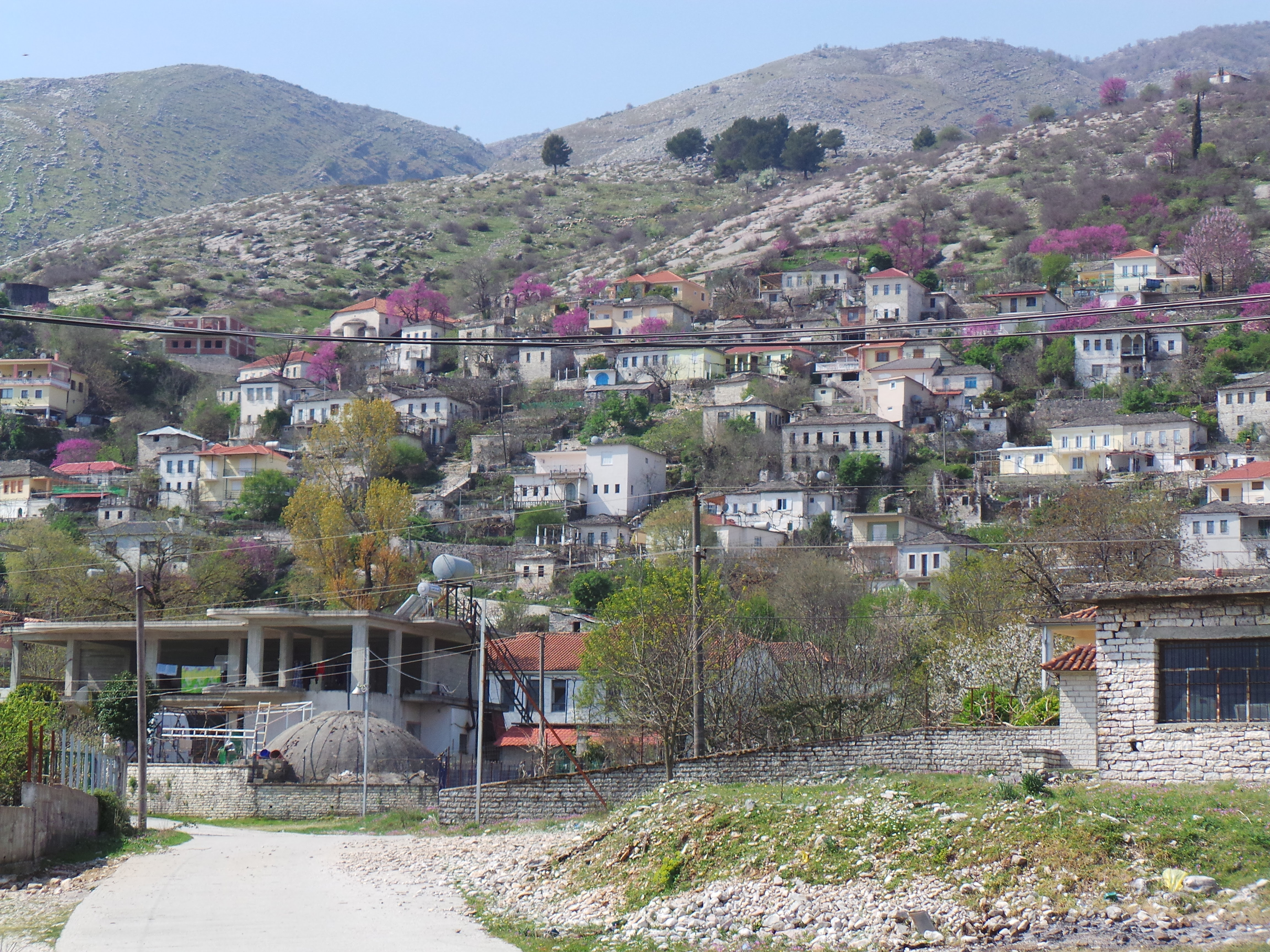 Άποψη από το χωριό Σωφράτικα